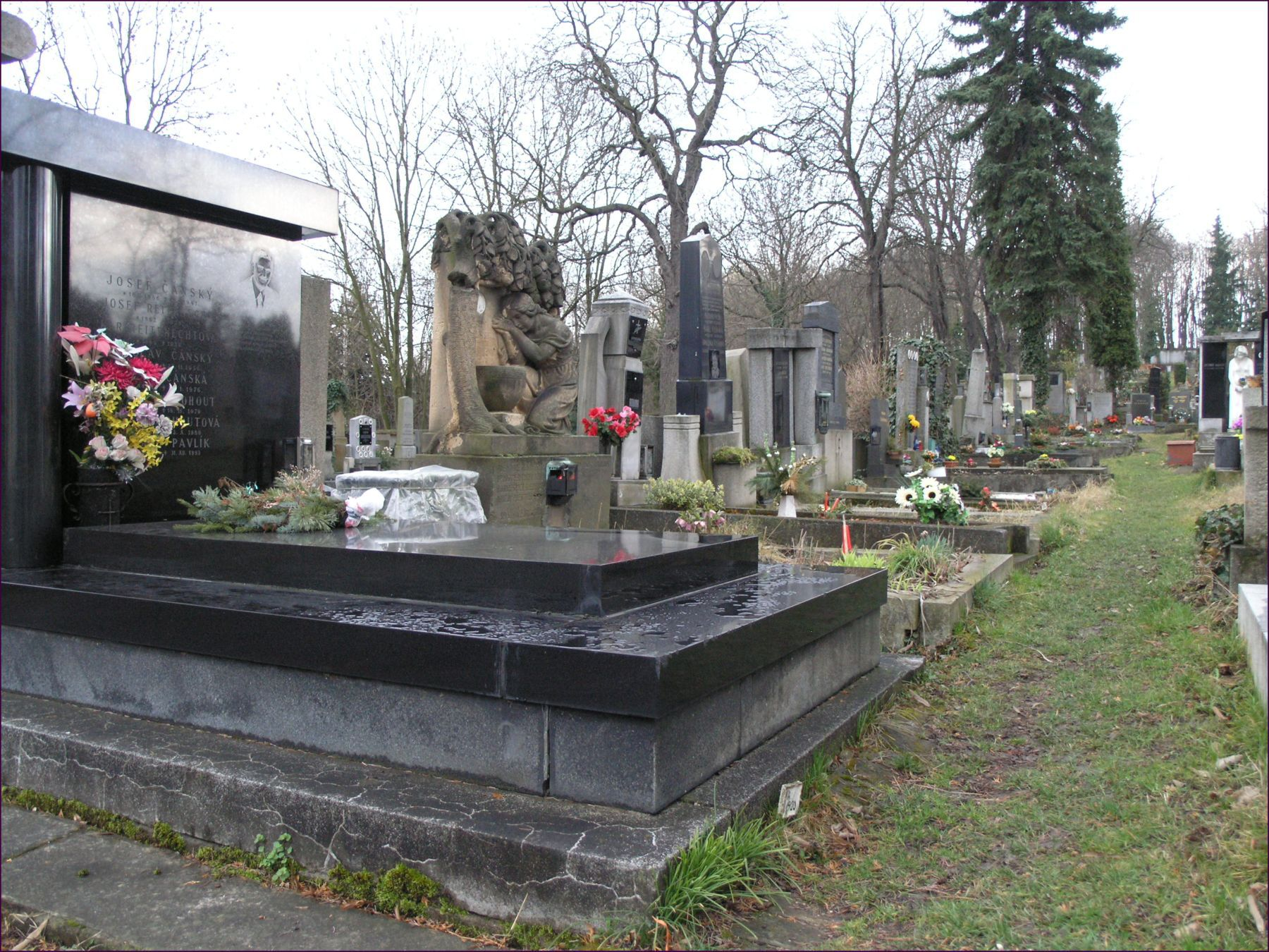 Praha, Košíře - Pod Kotlářkou 98/7, Košířský hřbitov